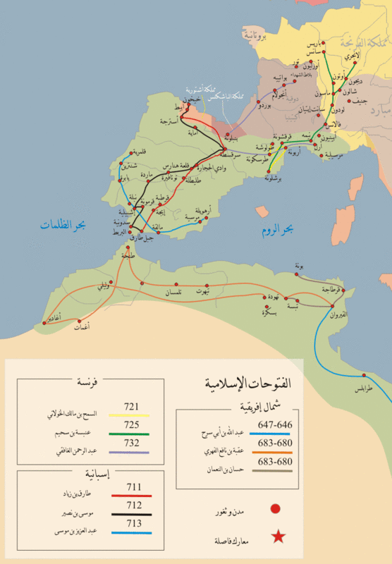 الفتوحات الإسلامية في شمال أفريقيا وجنوب غرب أوربا